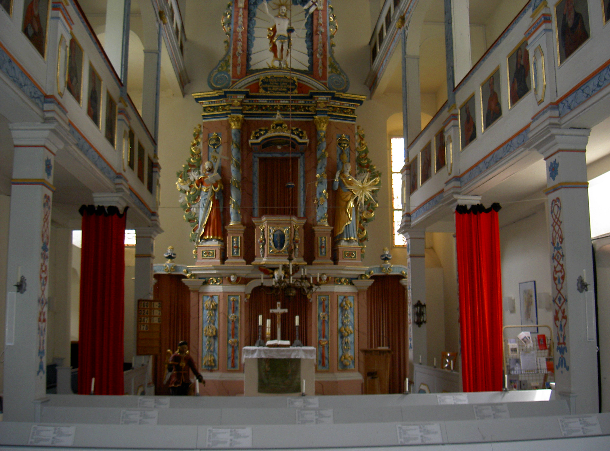 St. Peterskirche an der Brücke (Dorndorf)